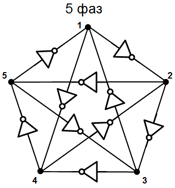 Fig7_ring_oscillator